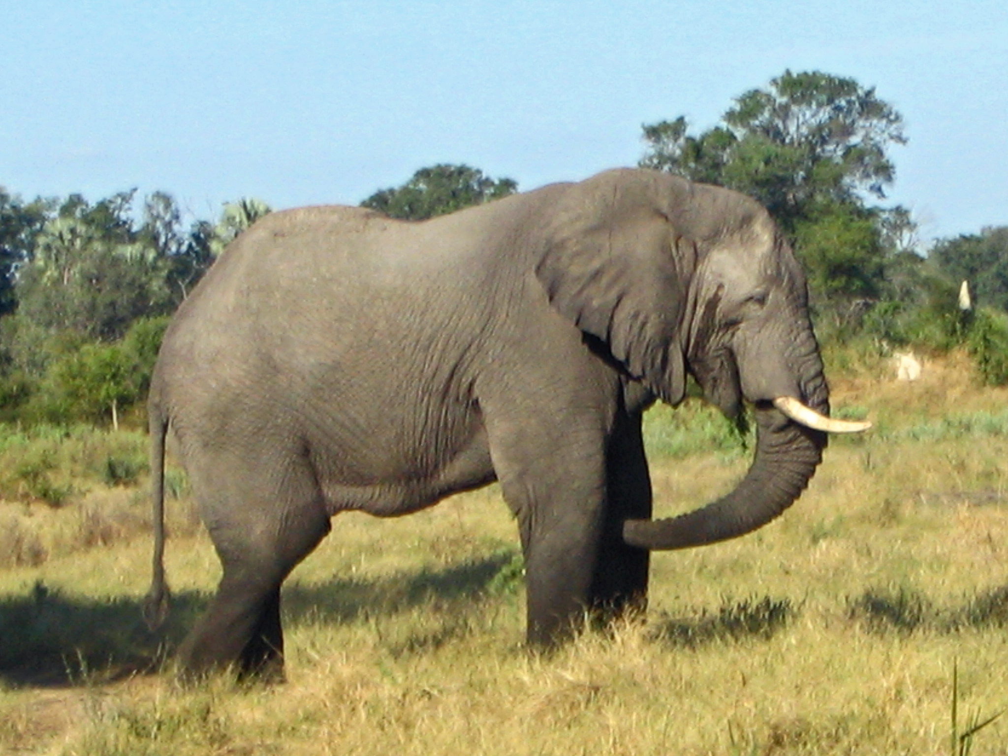 An Elephant seen in Botswana, 17/04/2006